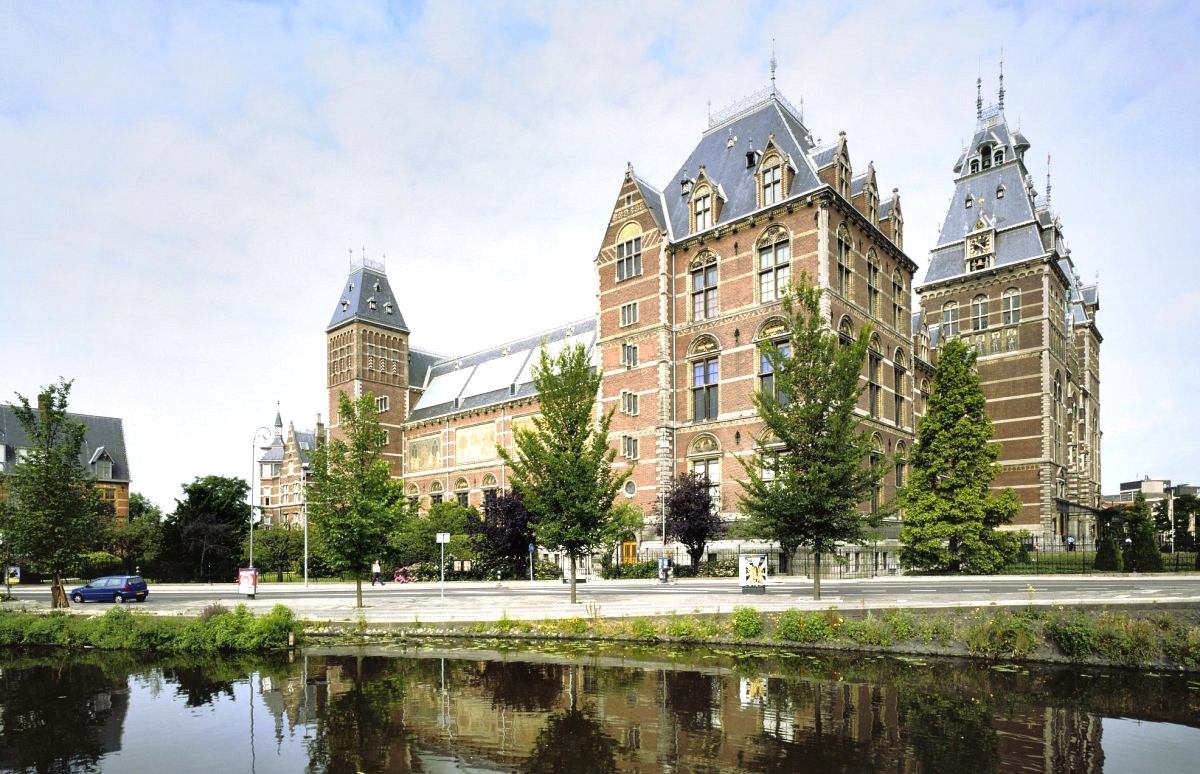 Rijksmuseum: Overzicht (opmerking: Gefotografeerd voor ANWB Monumentenboek)